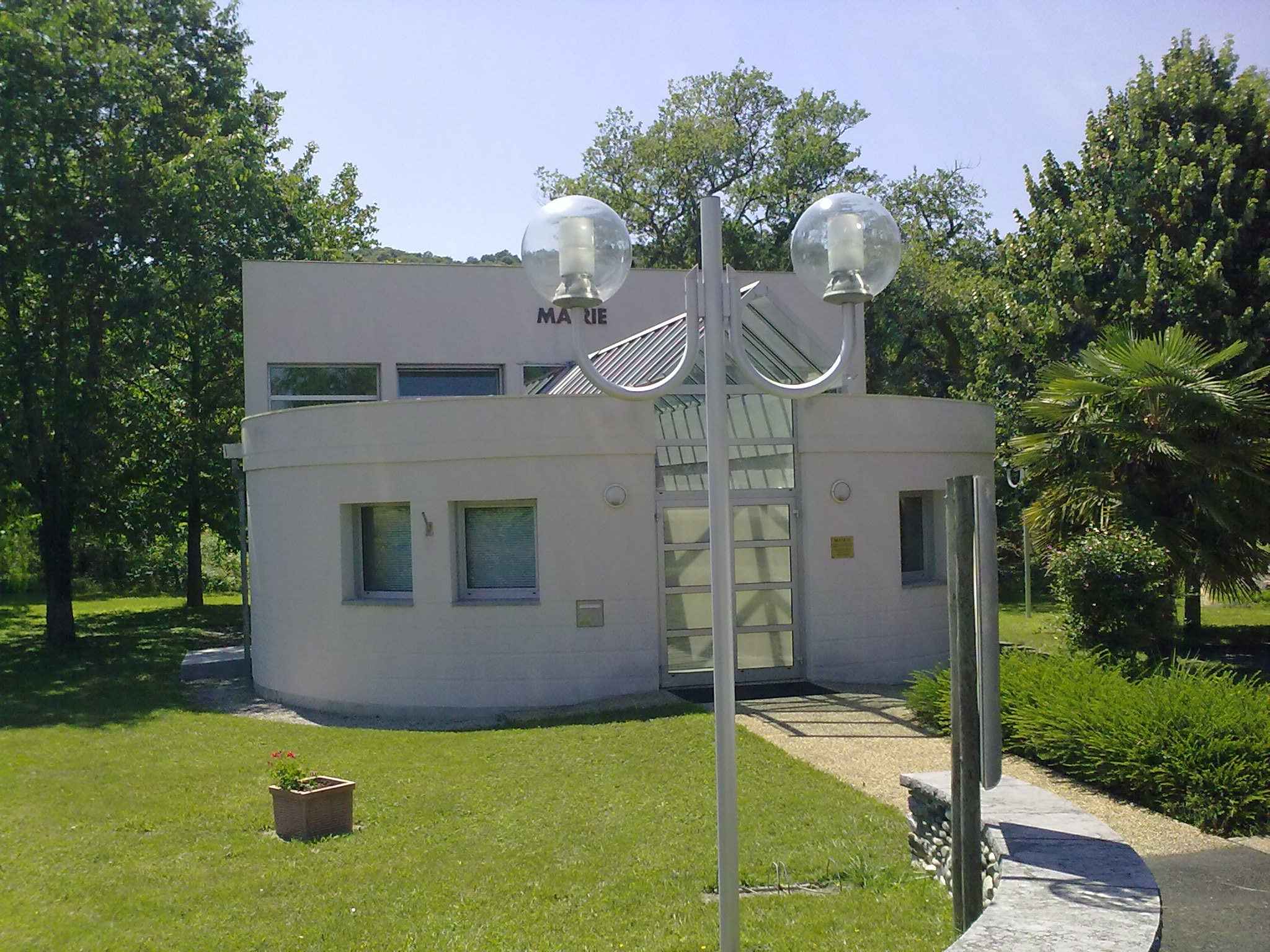 La mairie de Baliros.